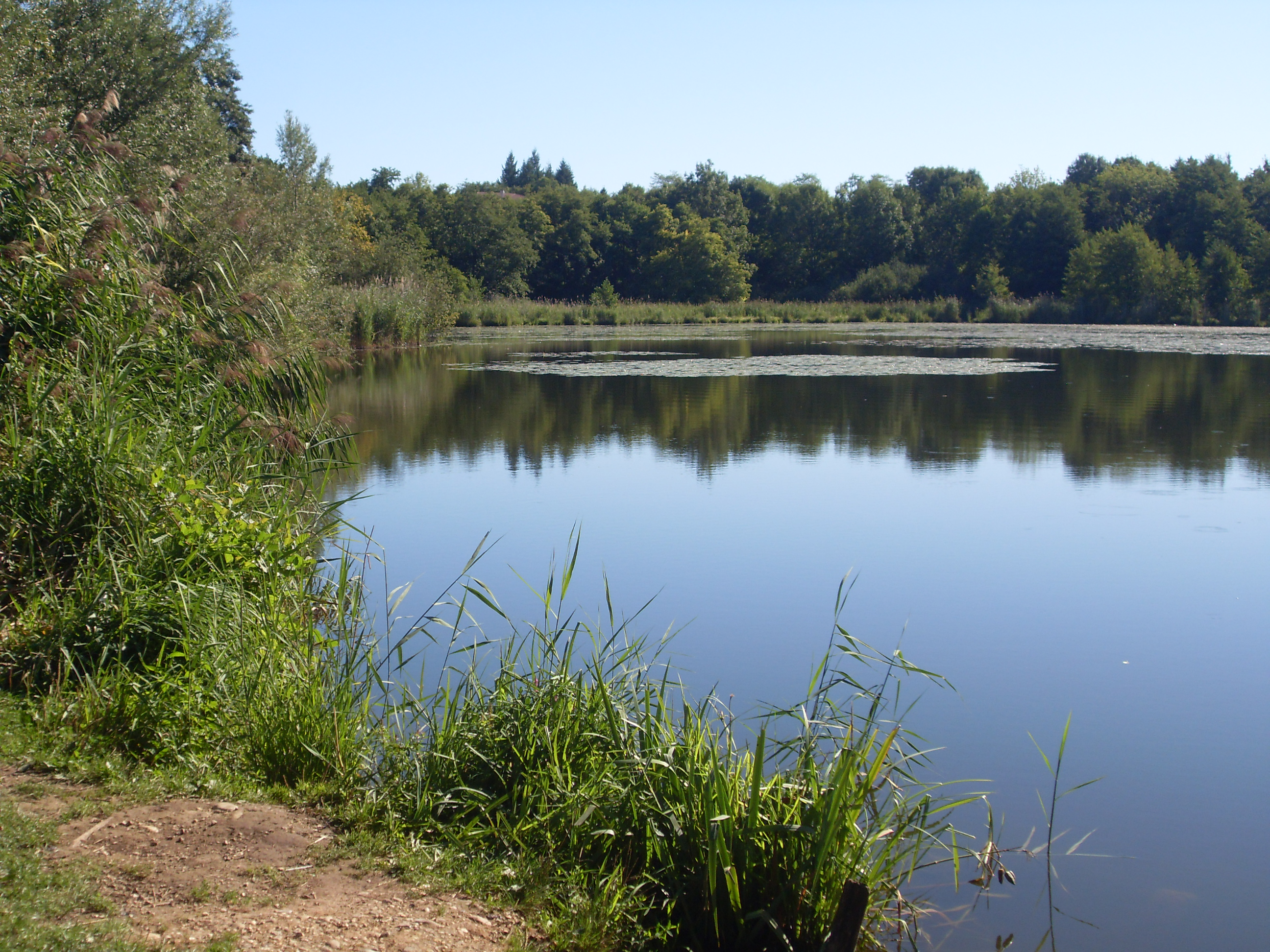 Étang Neuf de Villefontaine (Isère)